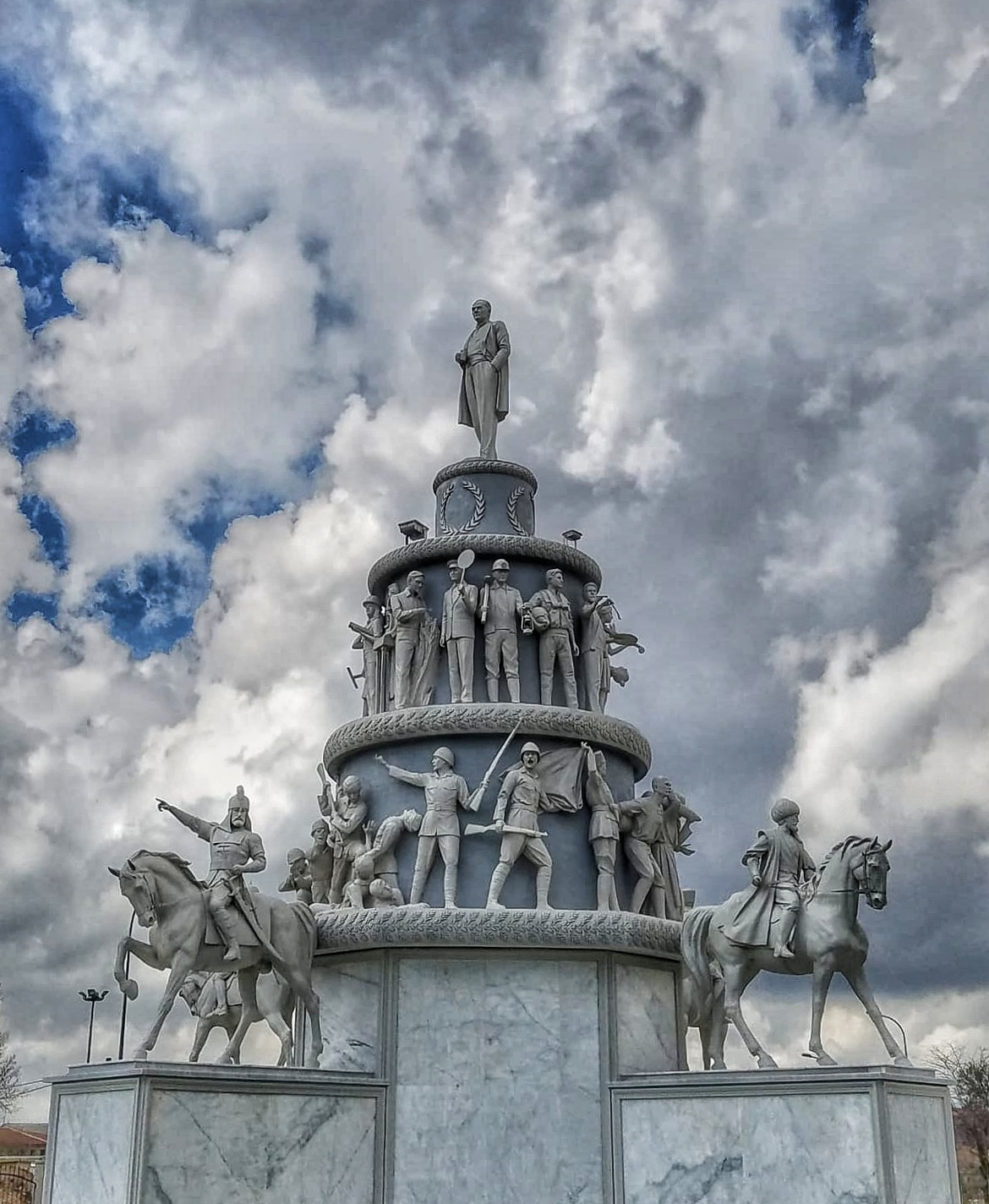 Eskişehir ulus anıtı